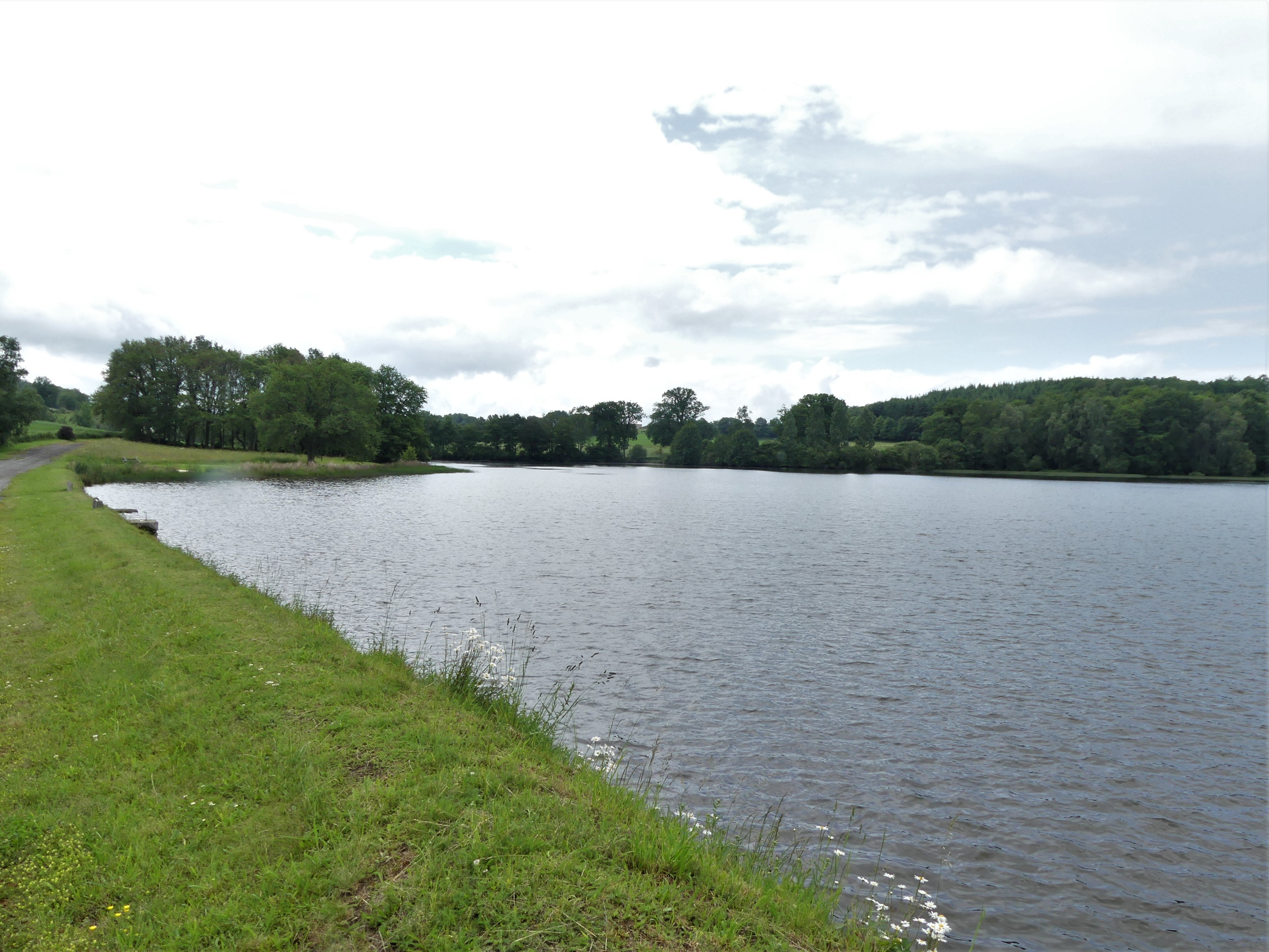 L'étang des Moines à Issoudun-Létrieix, Creuse, France.